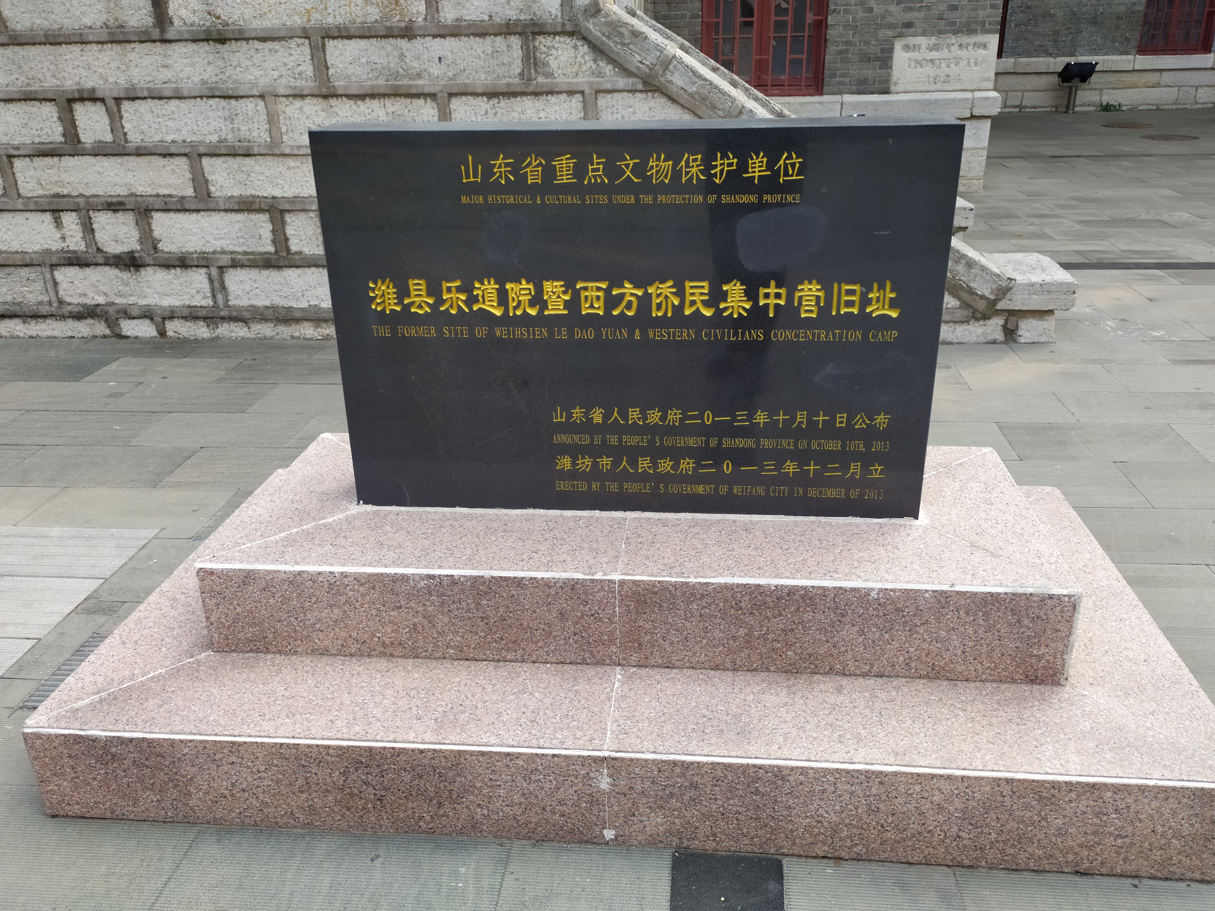 中文（中国大陆）: 乐道院及附近建筑